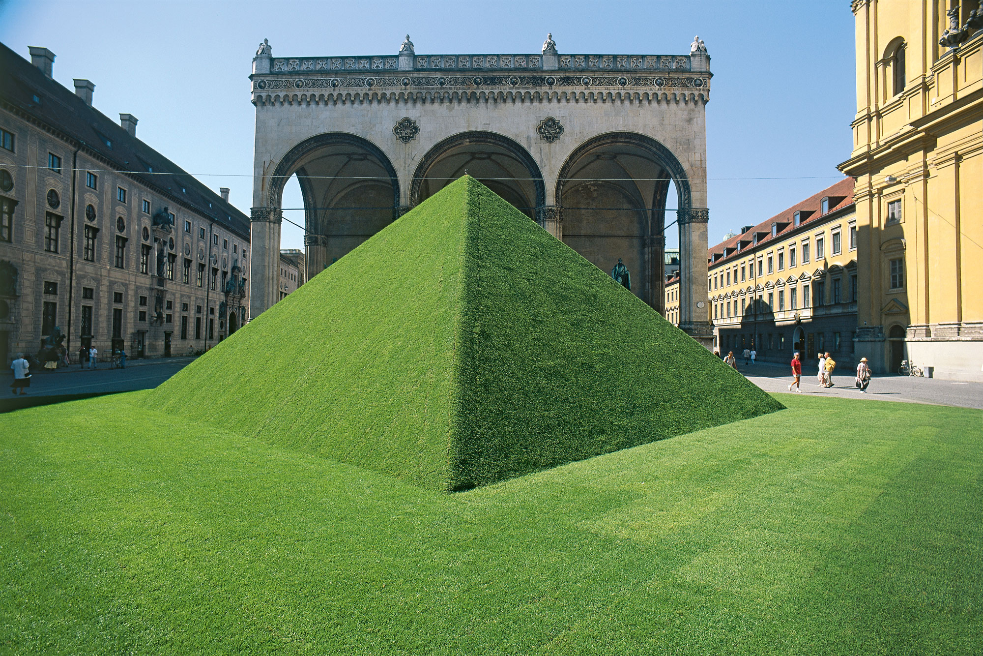 grüne Pryramide München